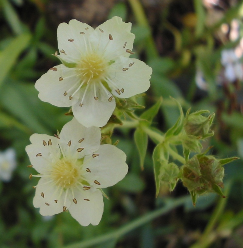 Potentilla alchemilloides, Jardin alpin, Jardin des Plantes de ParisBouba